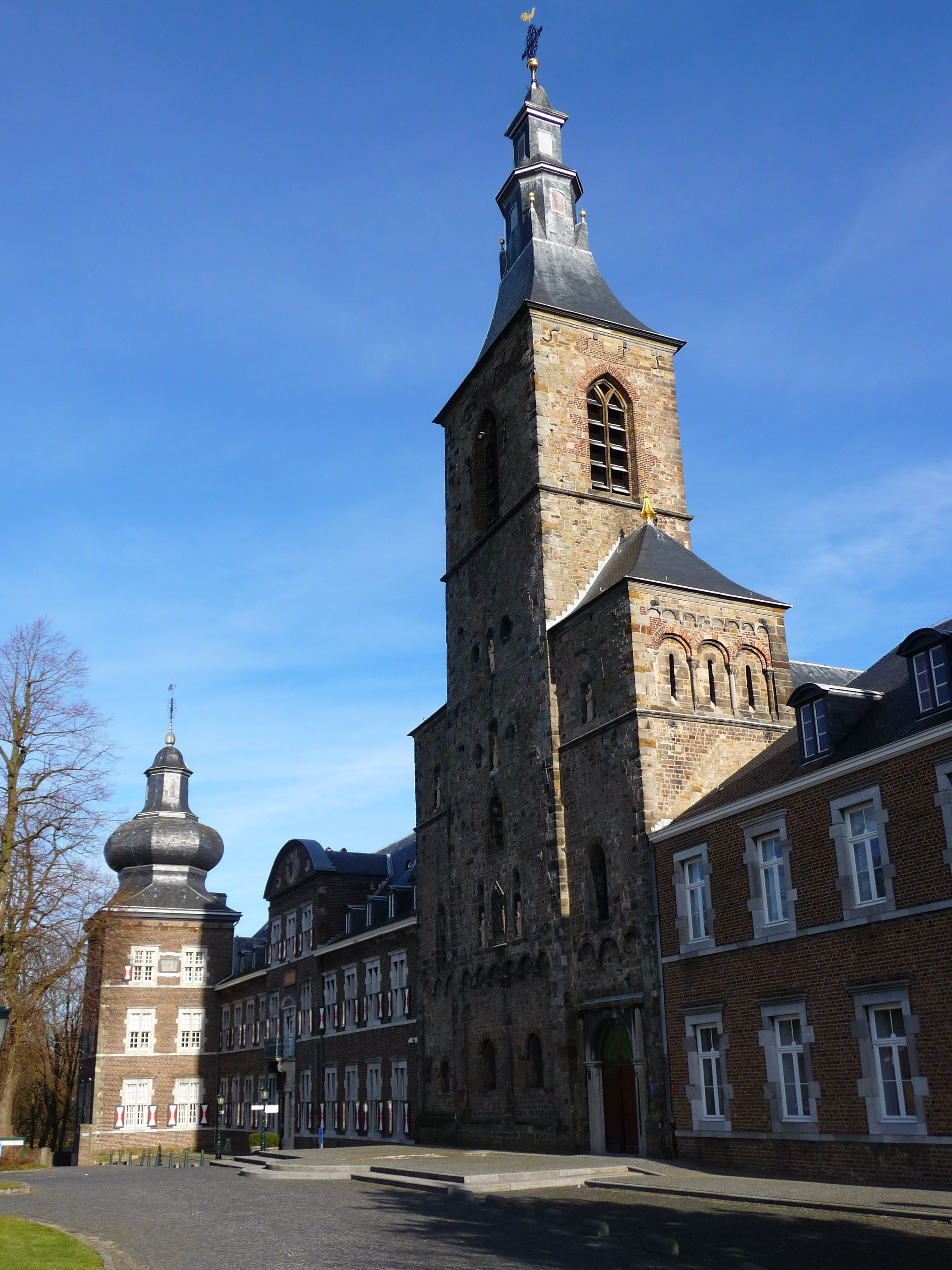 The Rolduc abbey in Kerkrade, the Netherlands